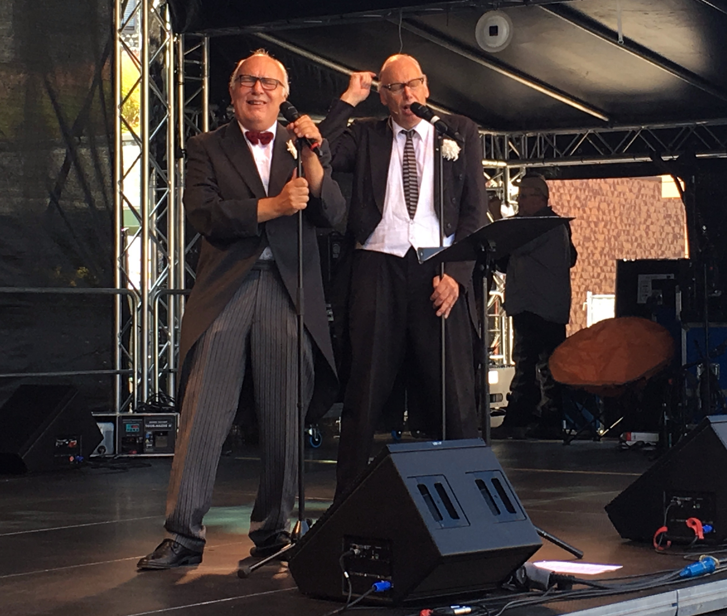 Deutschland, Bonn-Beuel, Bürgerfest; Bühne auf dem Rathausplatz: Norbert Alich (links) als Hermann Schwaderlappen und Rainer Pause (rechts) als Fritz Litzmann.